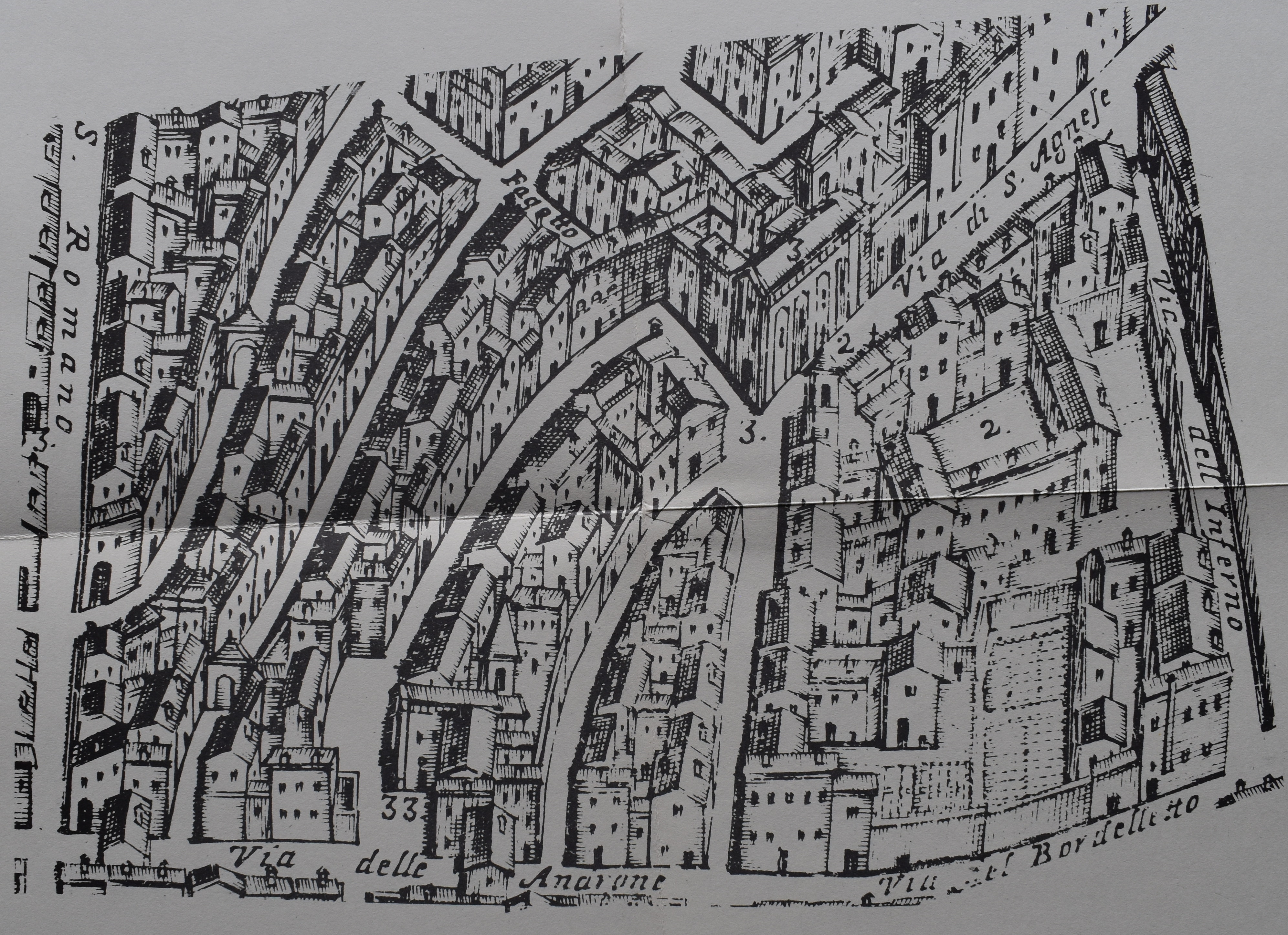 Ferrara chiesa Giovanni Battista. Incisione di Andrea Bolzoni, tavola XXIV in G.A. Scalabrini, Memorie istoriche delle chiese di Ferrara e de' suoi borghi munite, ed illustrate con antiche inediti monumenti, che possono servire all'Istoria Sacra della suddetta Citta' dedicate al nobil uomo il signor conte Francesco Greco in Ferrara MDCCLXXIII per Carlo Coatti con licenza de' superiori, 1773, Rif. 2 S. Agnese, Conservatorio di Zitelle. Rif. 3 S. Agnese Vicariato e Parrocchia. Ri. 33 S. Giacomo Parrocchia. Nelle pianta sono visibili le due porte che chiudevano il ghetto ebraico in corrispondenza di via Vignatagliata e via Vittoria.